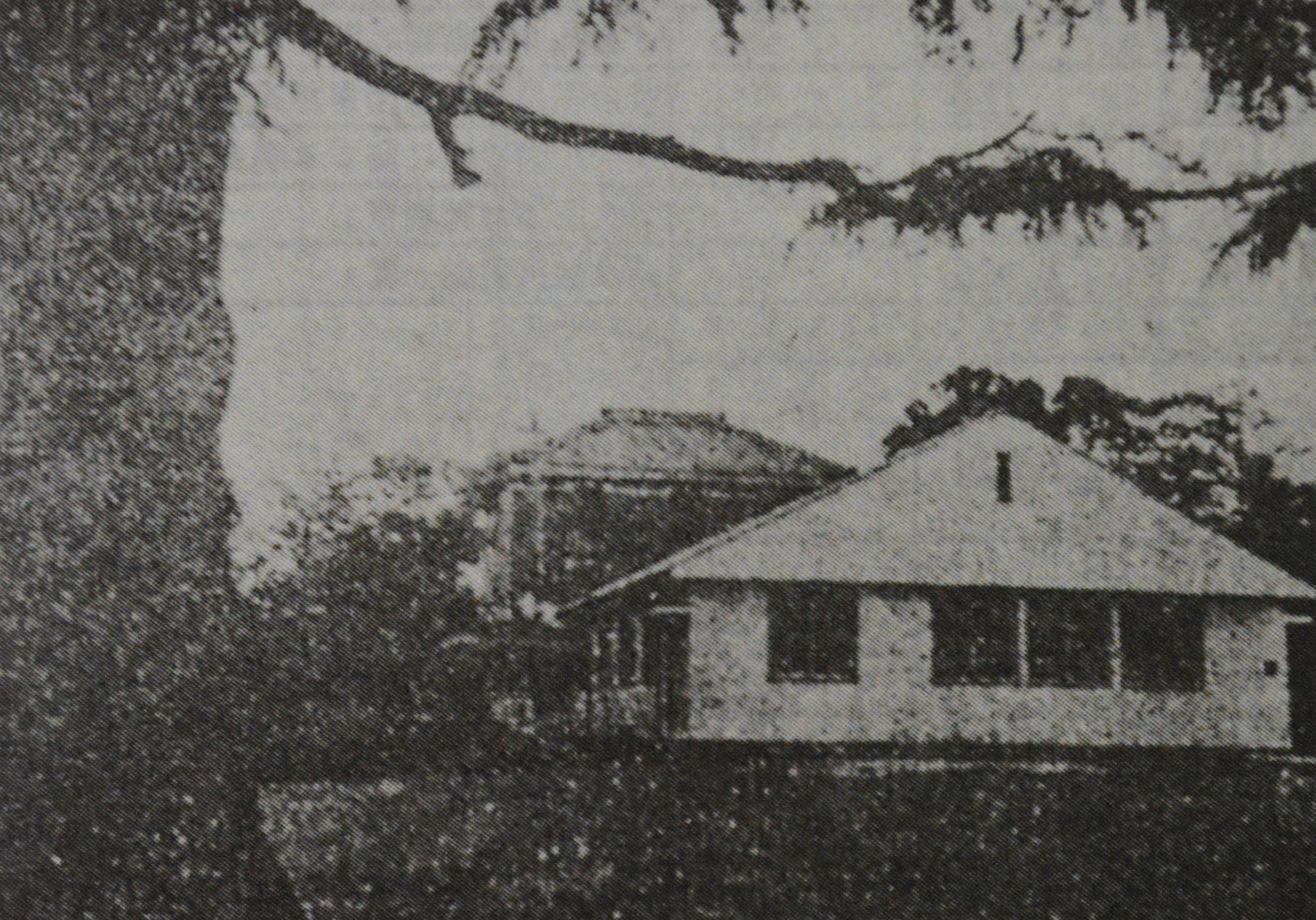 西尾市立図書館岩瀬文庫の閲覧室（手前）と書庫（奥）。